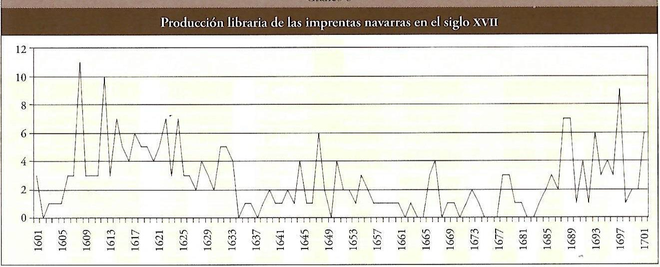 Producción de libros de las imprentas navarras en el siglo XVII